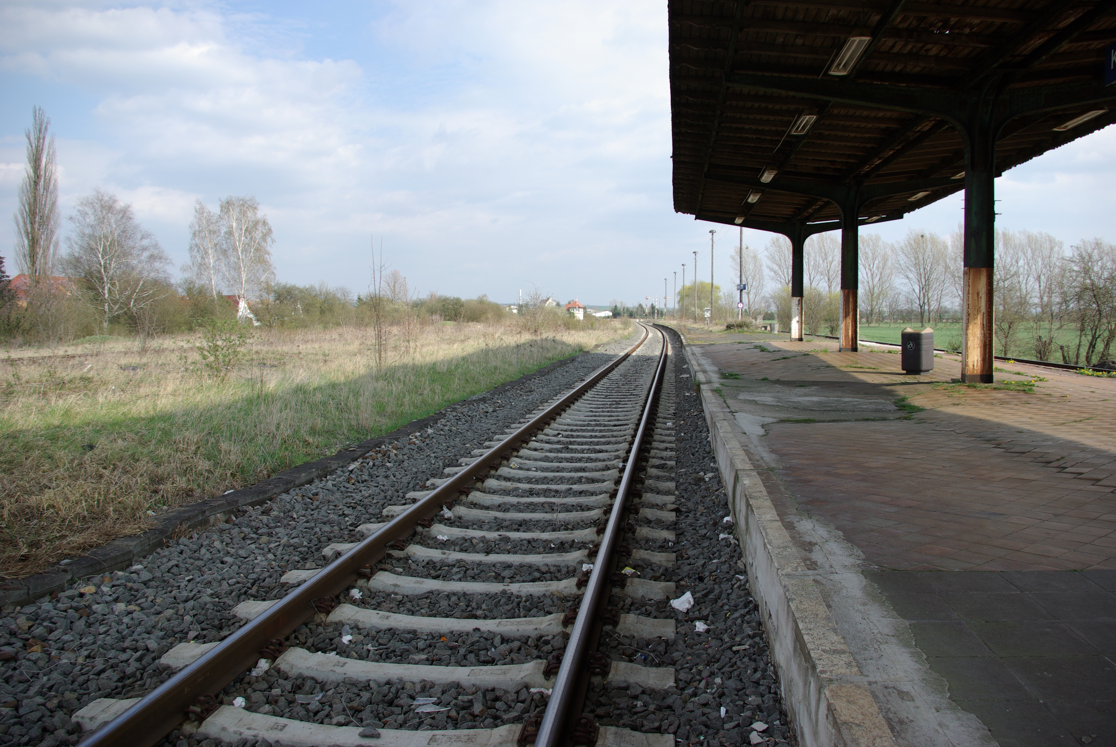 Koelleda, Landkreis Soemmerda, Thueringen, Deutschland